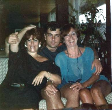 מימין לשמאל: he:רחל הרמתי, he:דודו דותן וhe:ציפי שביט, 1986